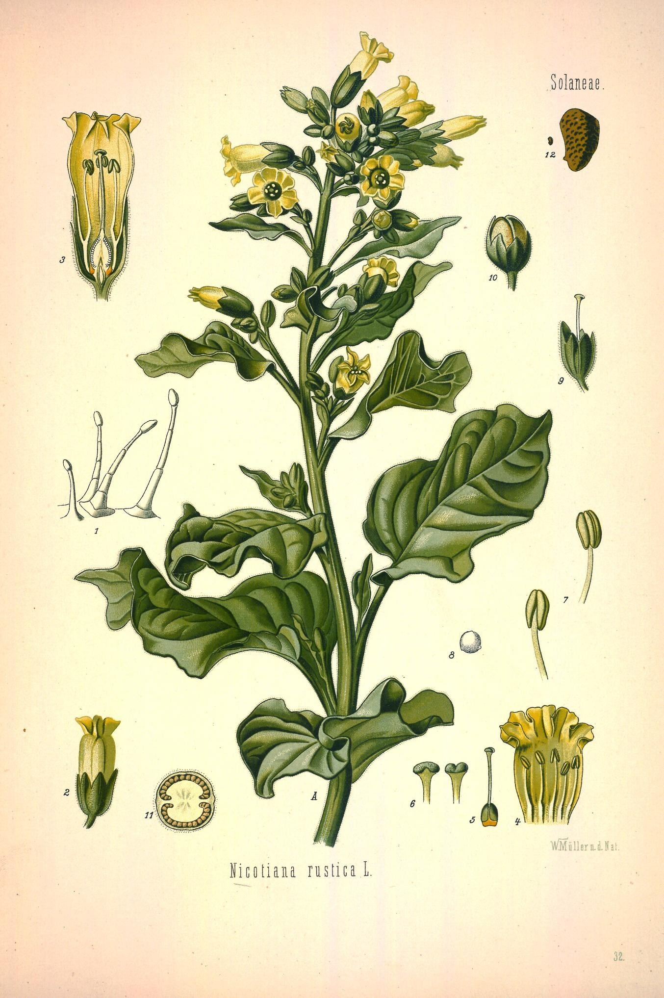 Bauern-Tabak. A blühende Pflanze in natürl. Grösse; 1 Behaarung, vergrössert; 2 Blüthe, etwas vergrössert; 3 dieselbe im Längsschnitt, stärker vergrössert; 4 aufgeschnittene Krone, desgl.; 5 Stempel, desgl.; 6 oberer Theil des Griffels mit Narbe, desgl.; 7 Staubgefässe, desgl.; 8 Pollen unter Wasser, desgl.; 9 abgeblühte Blüthe, desgl.; 10 Frucht, etwas vergrössert; 11 dieselbe im Querschnitt, stärker vergrössert; 12 Same, natürl. Grösse und vergrössert.